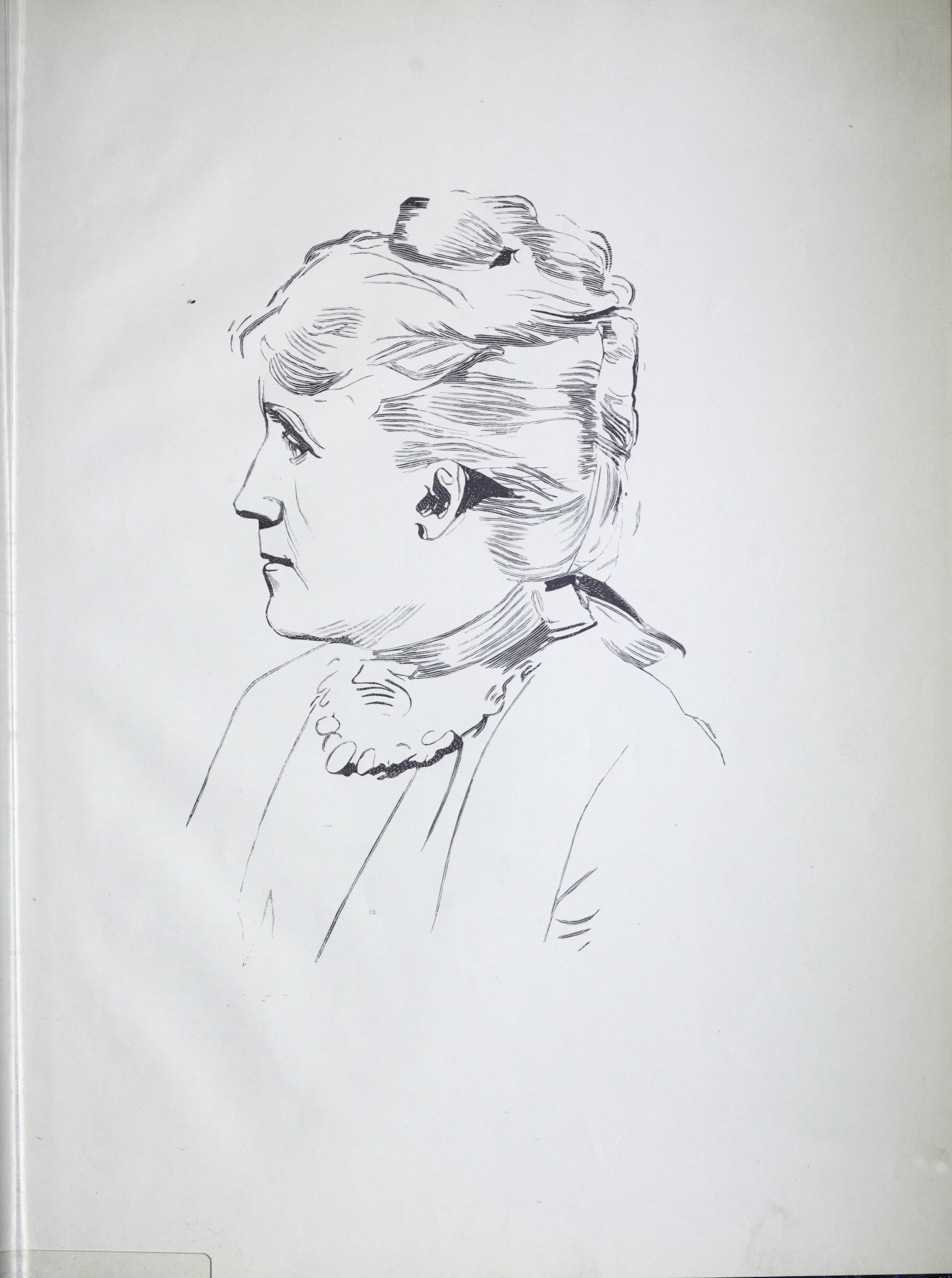 Illustrasjon hentet fra boken "12 af vore samtidige" av Krohg, Christian og utgitt av Feilberg & Landmark (Kristiania, 1895) Depicted person: Erika Nissen